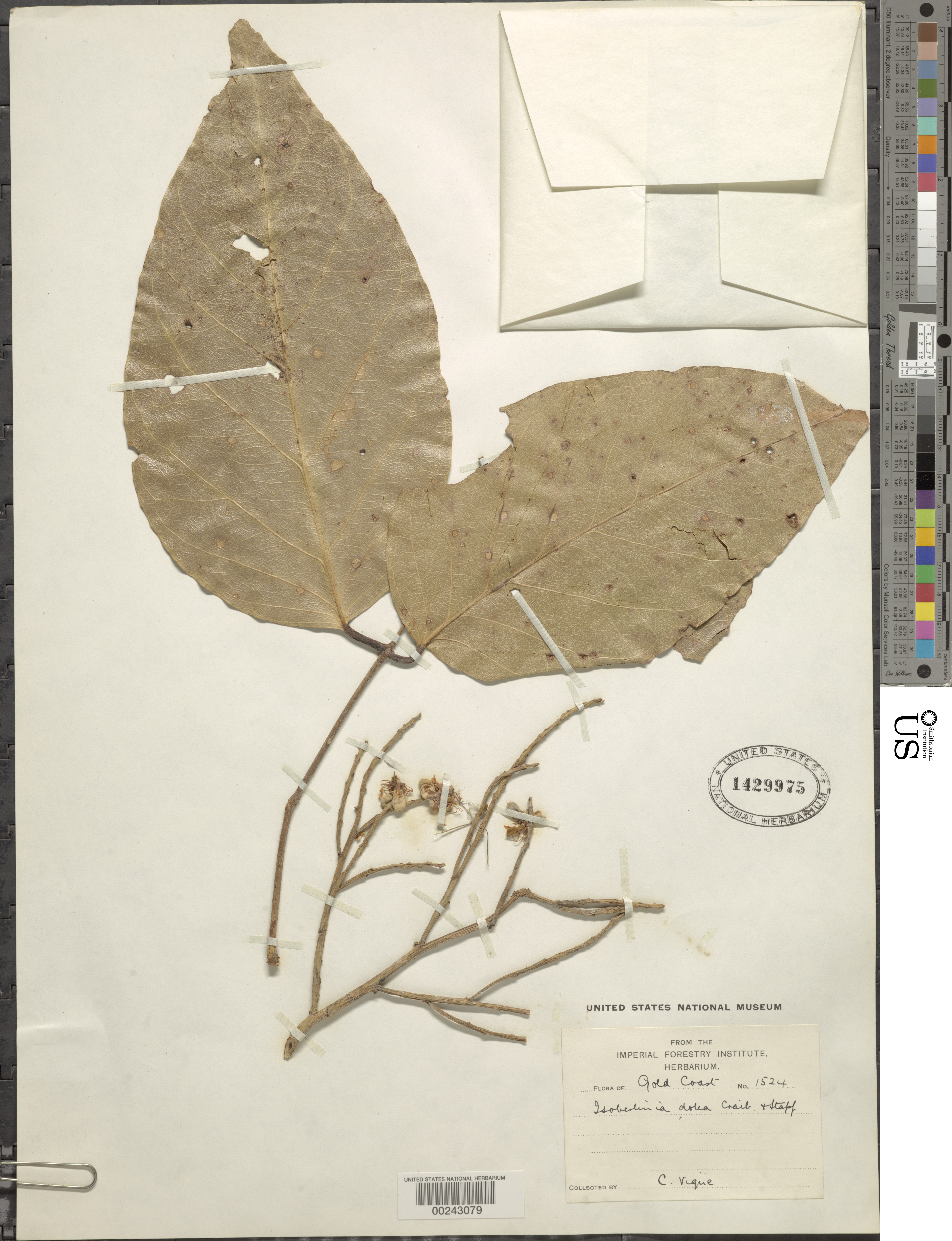 Isoberlinia doka Craib & Stapf Object Details Biogeographical Region 22 - West Tropical Africa Collector C. Vigne Record Last Modified 8 Apr 2017 Specimen Count 1 Barcode 00243079 USNM Number 1429975 Place Ghana, Africa Published Name Isoberlinia doka Craib & Stapf Taxonomy Plantae Dicotyledonae Rosales Fabaceae Caesalpinioideae NMNH - Botany Dept. Record ID nmnhbotany_2437227 Usage of Metadata (Object Detail Text) CC0 GUID (Link to Original Record)